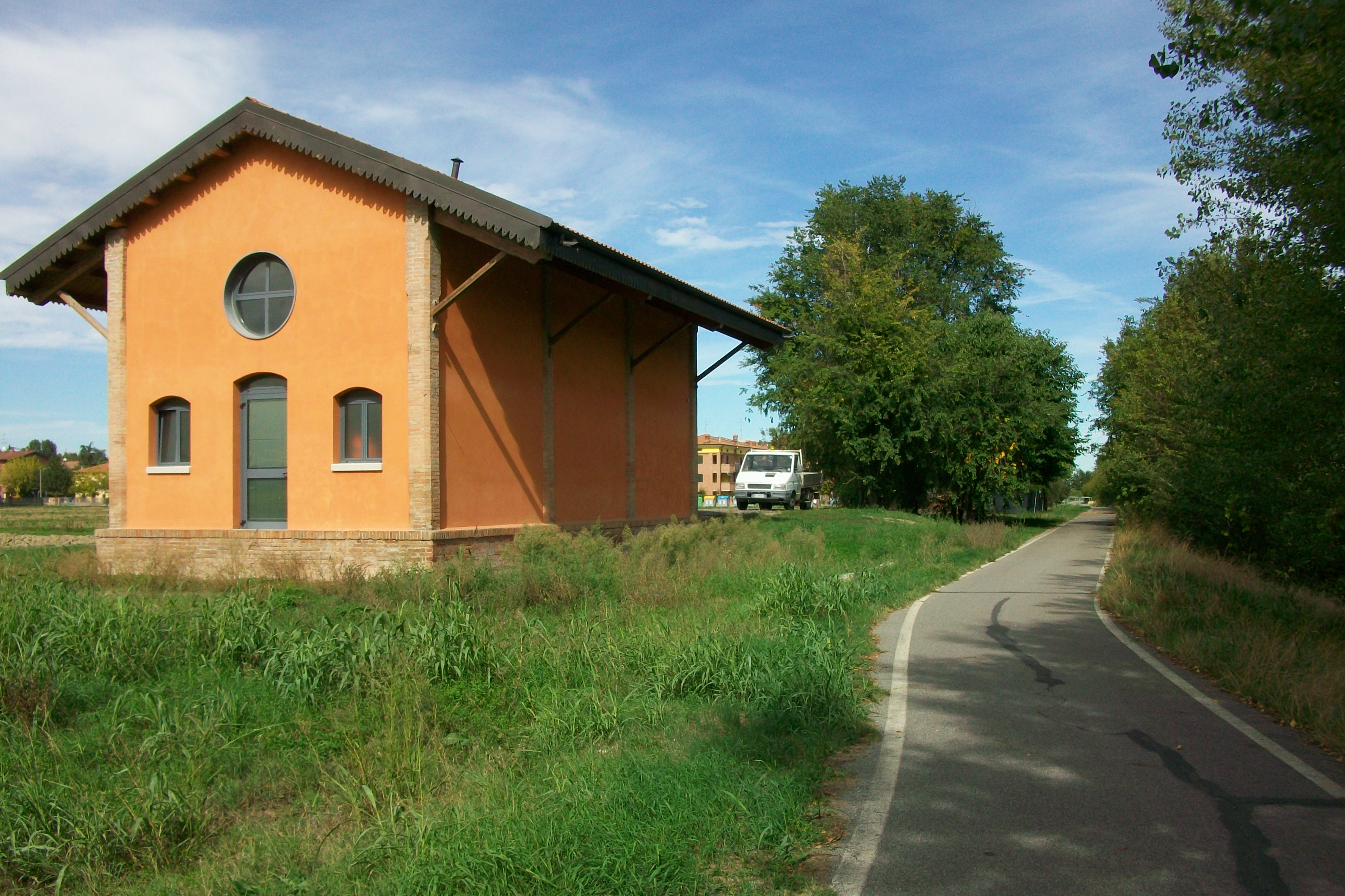 Stazione ferroviaria di Bastiglia, il magazzino merci